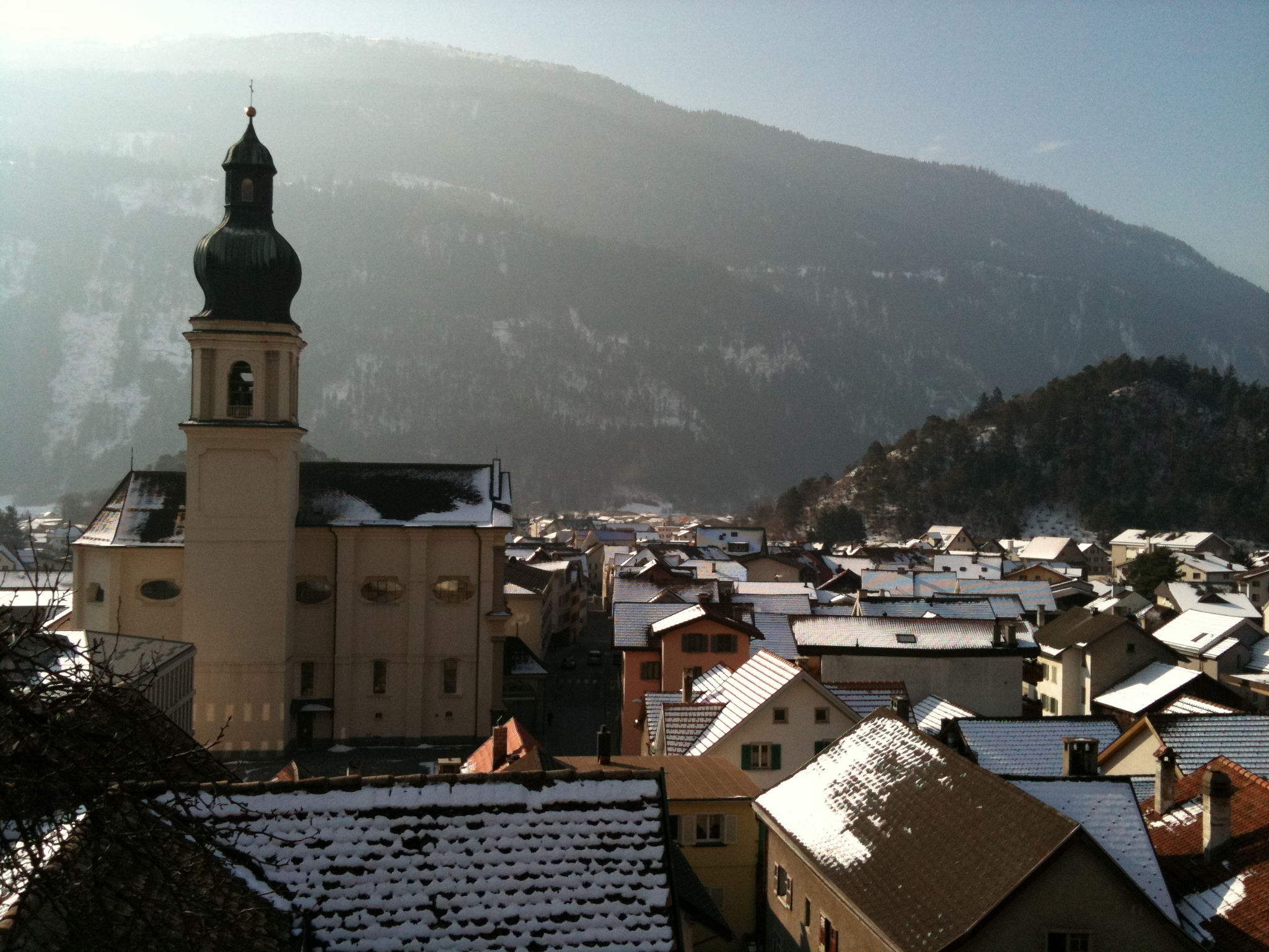 Domat/Ems, Dorfkirche und Ortskern